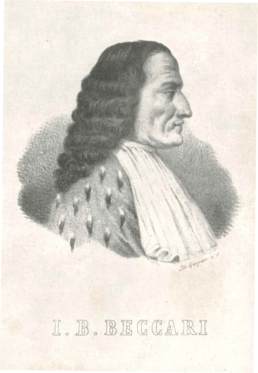 Ritratto di Jacopo Bartolomeo Beccari, Giovanni Pini, Jacopo Bartolomeo Beccari, Licinio Cappelli, Bologna 1940